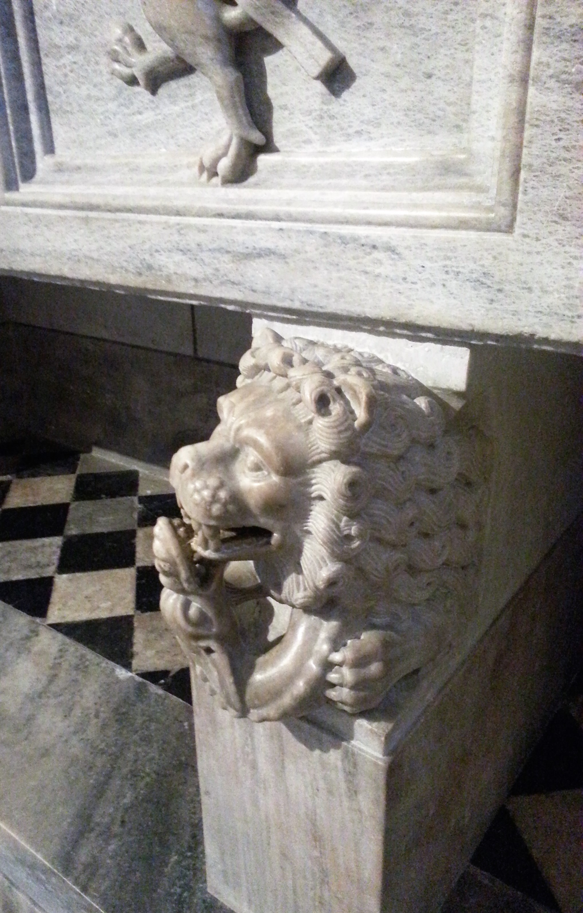 particolare del monumento funebre posto nella chiesa di santa Maria Maggiore.Leone con il bocca il serpente